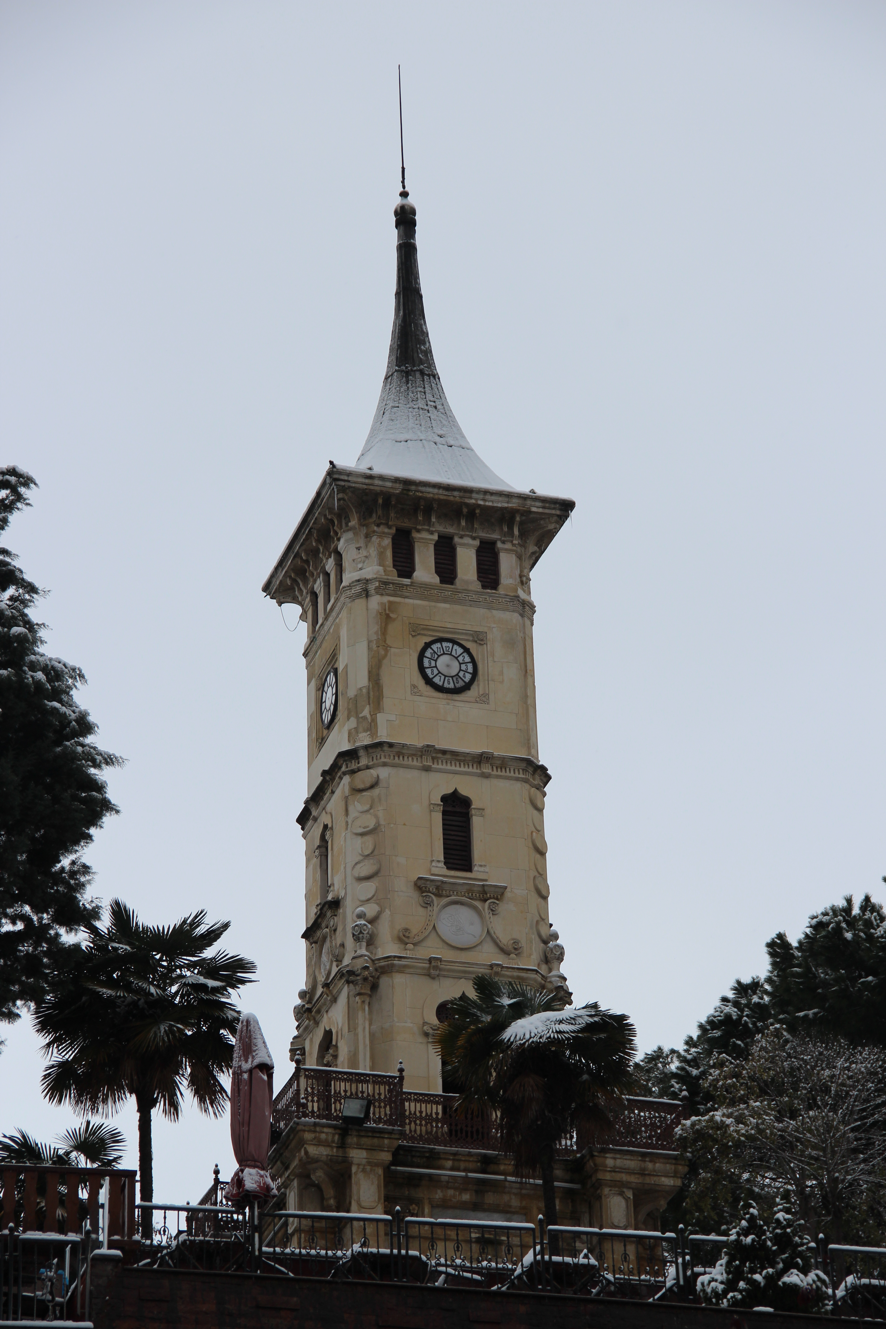 İzmit clock tower